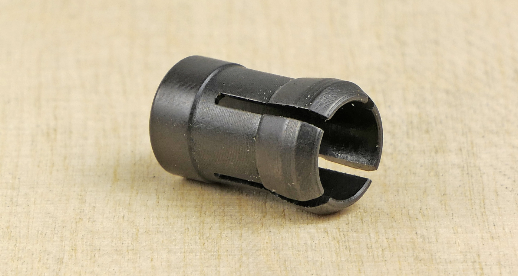 Tulejka zaciskowa do frezarek górnowrzecionowych. Standardowe rozmiary średnic to: 6 i 8 mm.